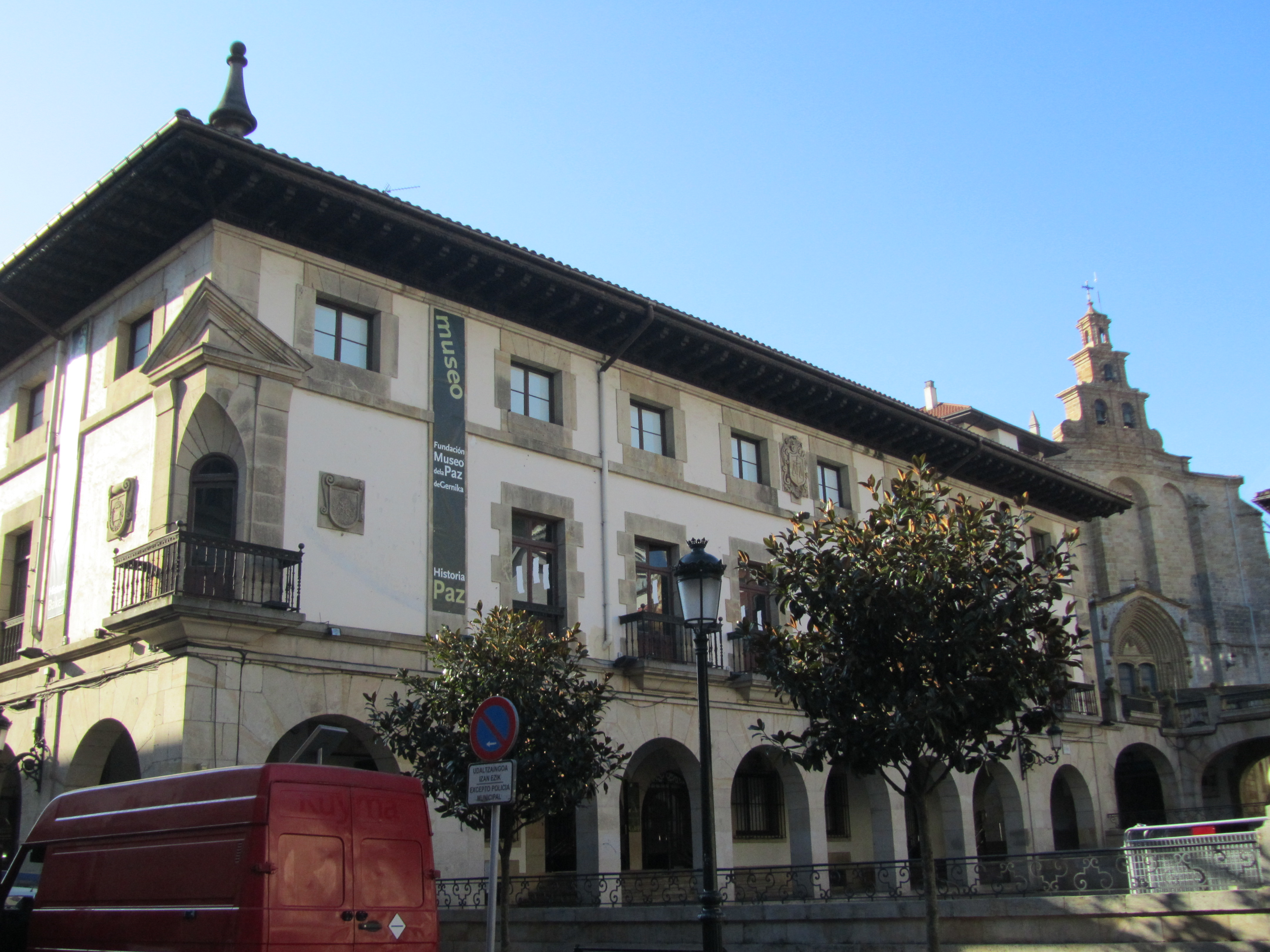 Exterior del Museo de la Paz, Bakearen Museoa en euskara, de Gernika-Lumo